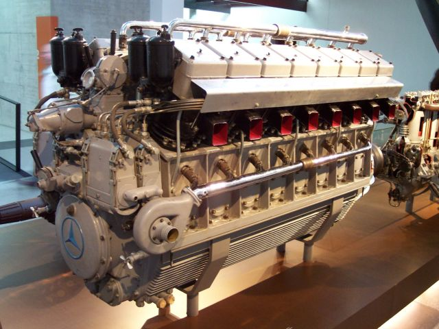 Mercedes Benz DB 602